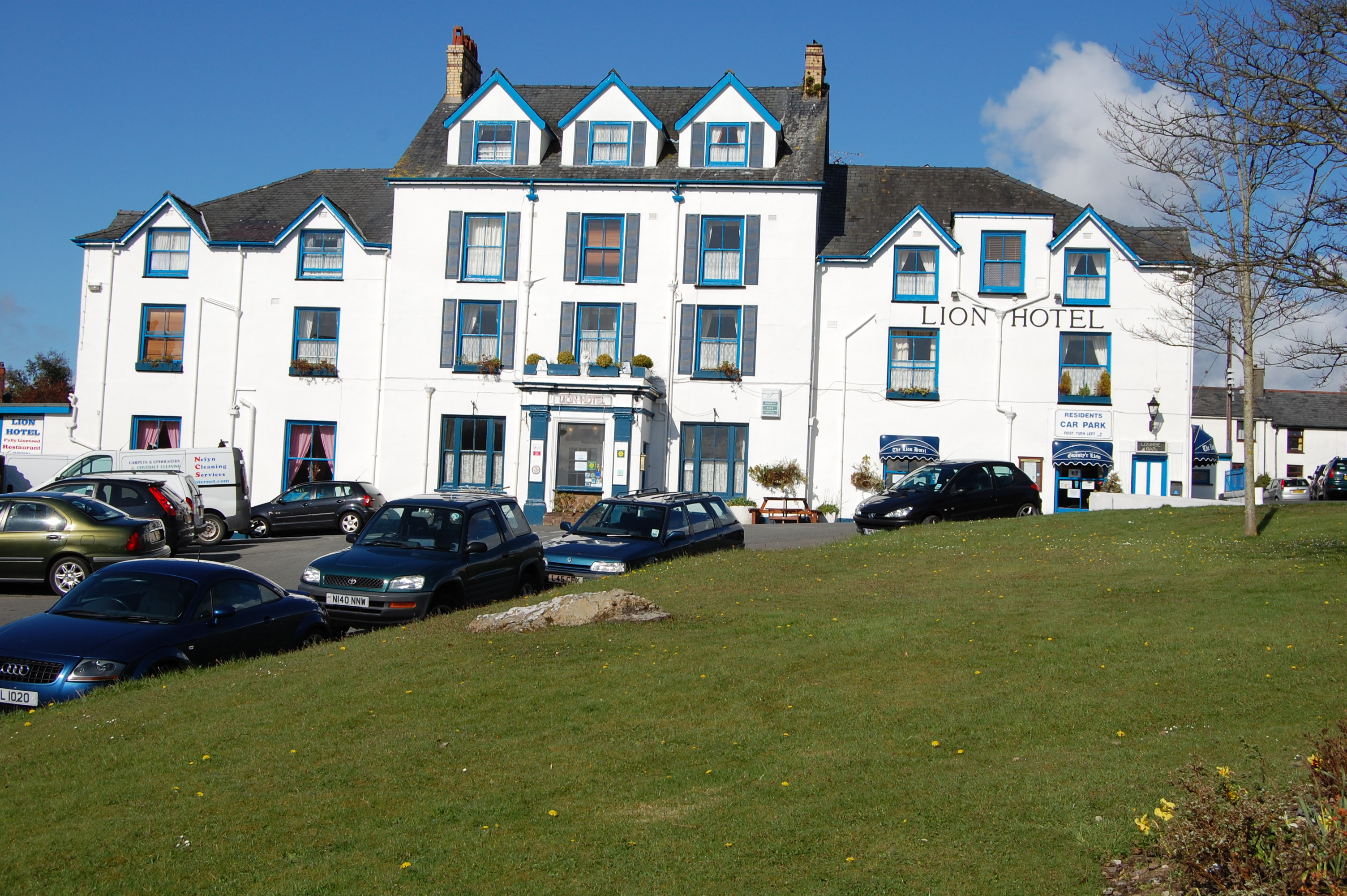 Lion Hotel, Criccieth